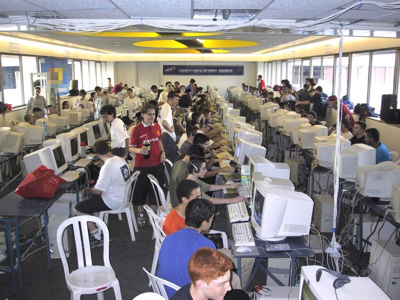 מסיבת רשת, שהתקיימה בתל אביב בחודש יוני 2001. המסיבה אורגנה על ידי צוות סייבר-קלאבר ונערכה בתוך הגשר שבין שני חלקי דיזנגוף סנטר